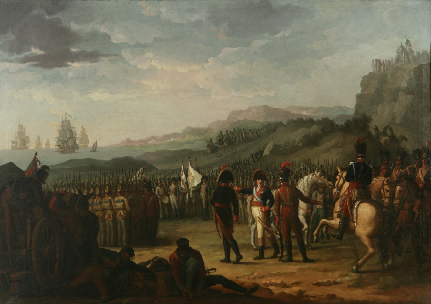 El lienzo representa el momento en que las tropas españolas en Dinamarca a las órdenes del marqués de la Romana, Pedro Caro y Sureda, se disponían a embarcar hacia España. Se encontraban allí para proteger a Dinamarca, que era aliada de Napoleón, al tiempo que esperaban la orden para invadir Suecia, operación que nunca se llevó a cabo. Pero cuando el cuerpo expedicionario español, que estaba formado por unos 14.000 hombres, tuvo conocimiento del levantamiento del 2 de mayo contra las tropas napoleónicas que habían invadido España, intentaron huir de Dinamarca y lo consiguieron seis meses después aunque con la ayuda de la armada británica.